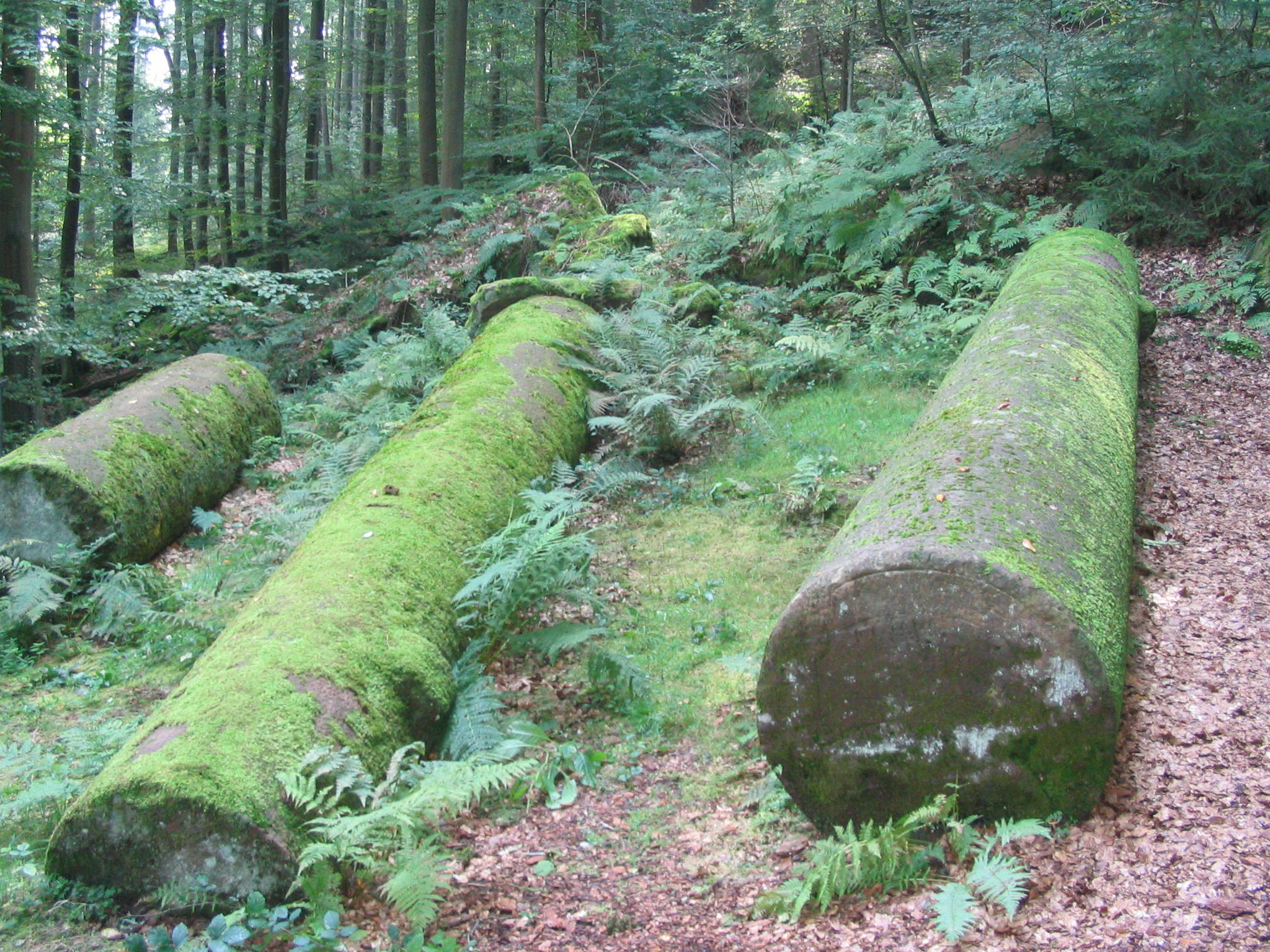 Am Bullauer Berg bei Miltenberg/Mainbullau (Buntsandstein Odenwald) vermutlich im Mittelalter aus dem Kristallsandstein vor Ort gehauene Heunesäulen (=Hünensäulen)